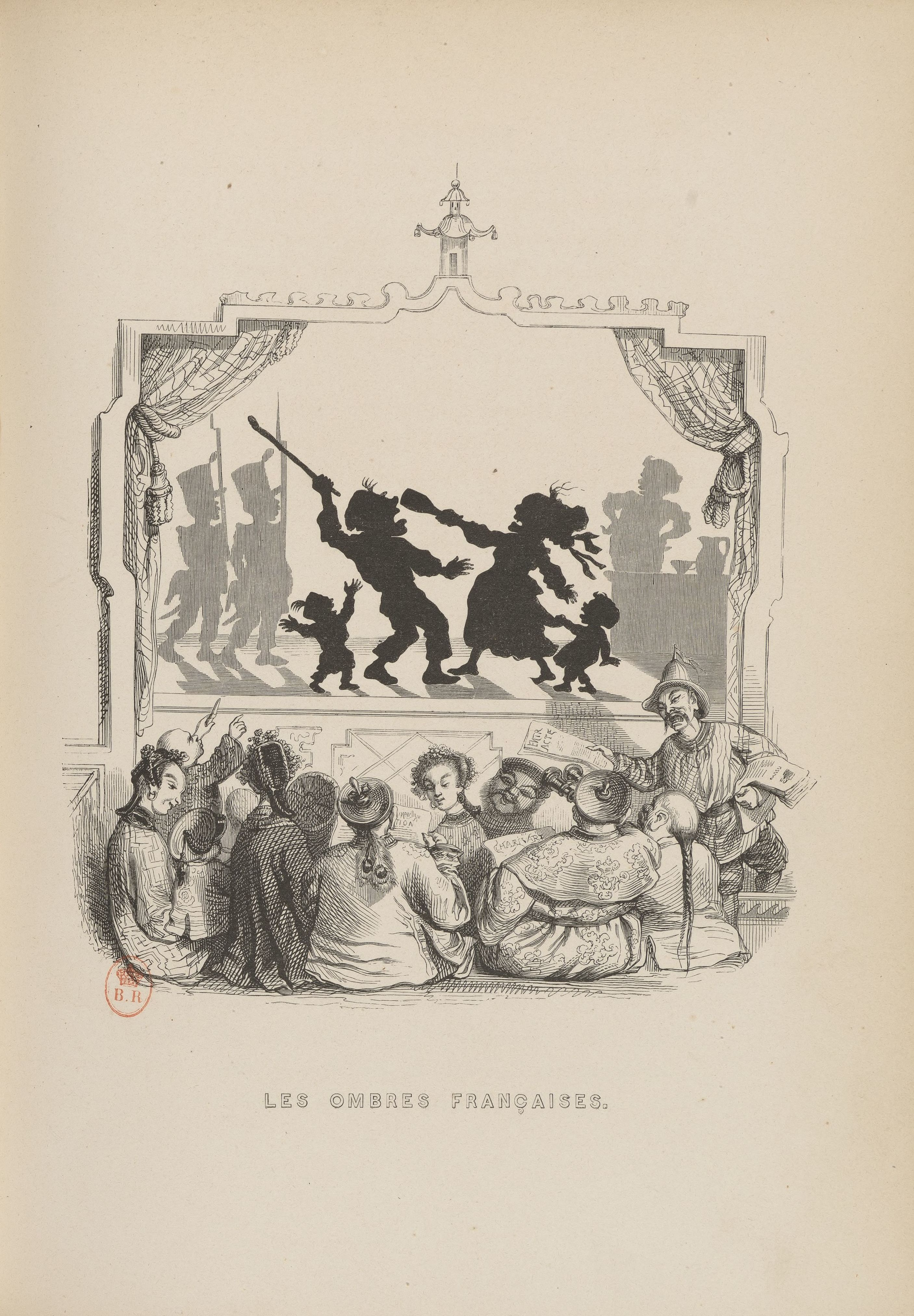 Illustration from Un Autre Monde